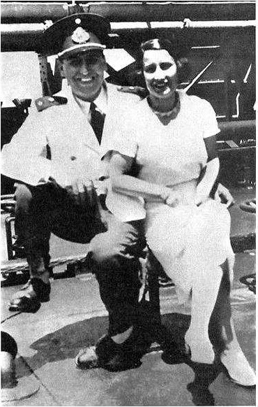 Juan Perón y su primer esposa, Aurelia Tizón, durante los años '30.